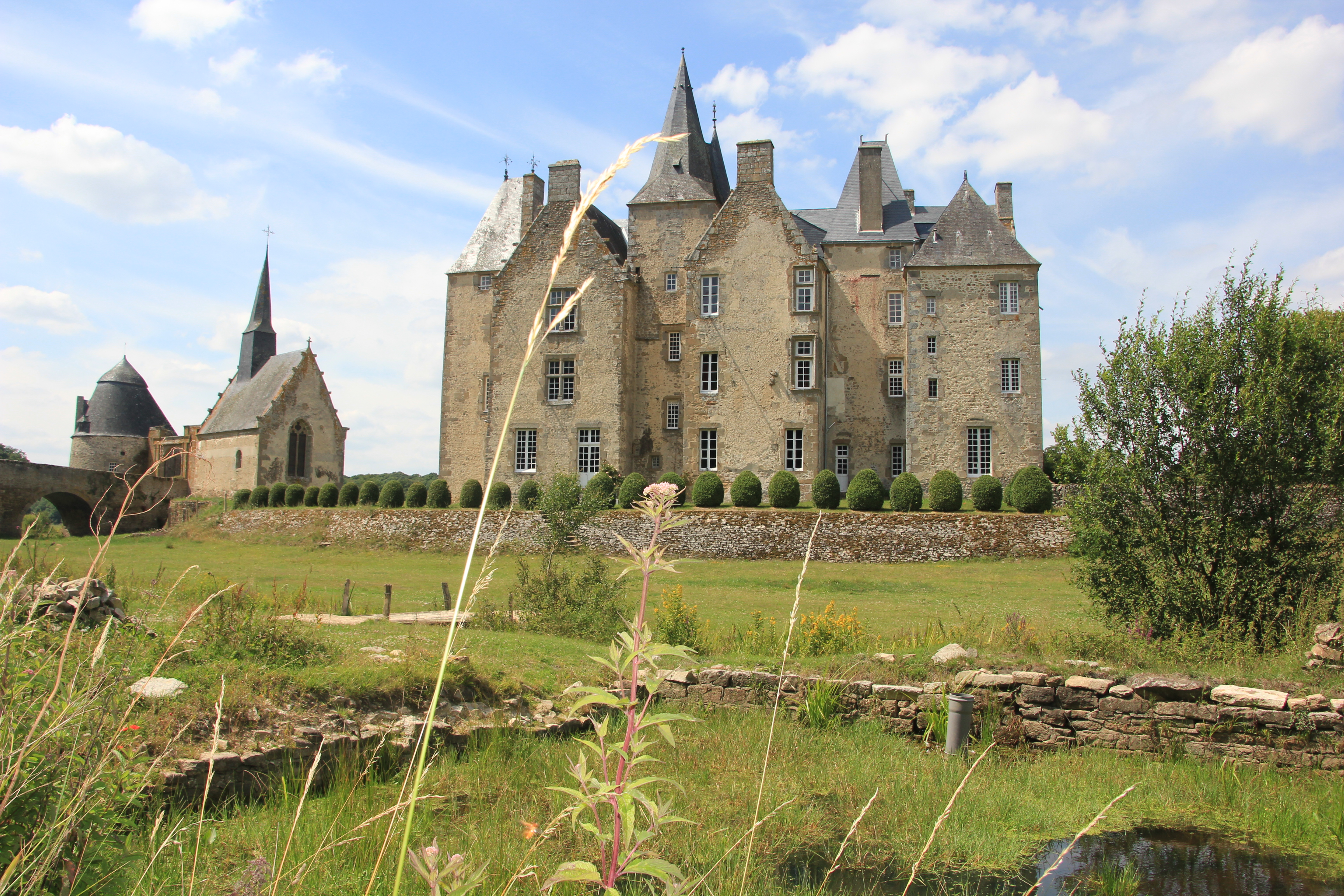 Photo de la façade sud prise en contre-bas du château dans les anciennes douves aujourd'hui asséchées, ces zones humides accueillent une grande biodiversité. This building is en partie classé, en partie inscrit au titre des Monuments Historiques. .